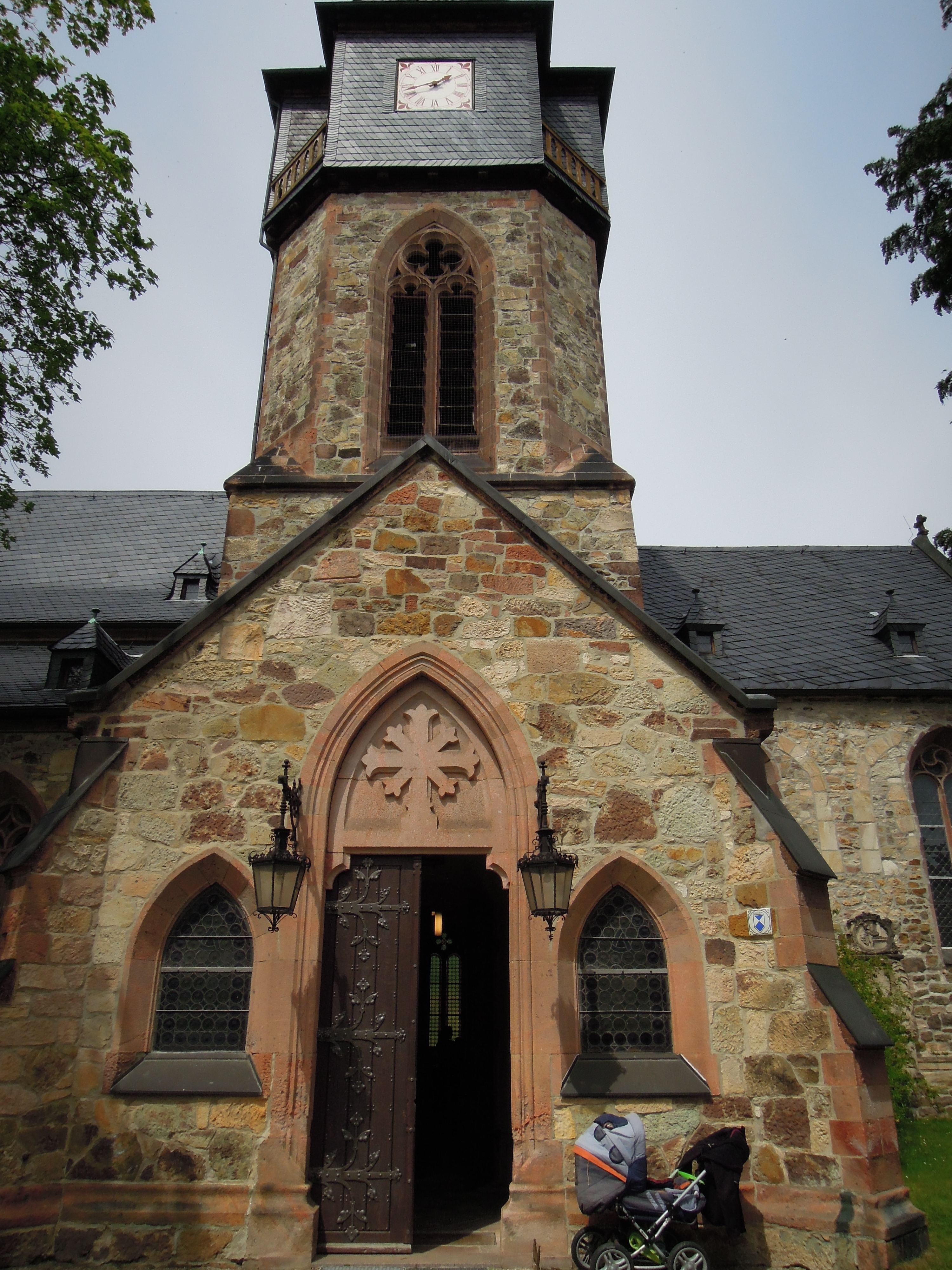 Kohrener Sankt-Gangolf-Kirche Außen Südportal Frontal 2015